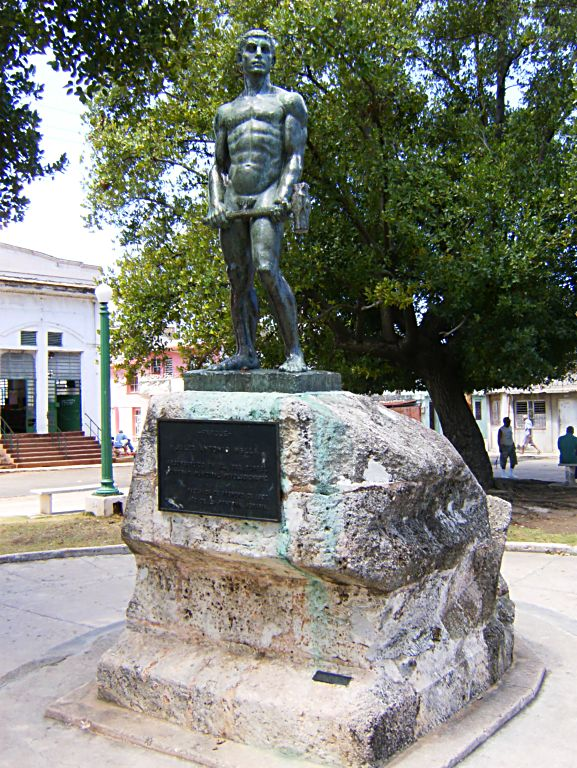 Estatua colocada en el parque Julio Antonio Mella, o parque de los trabajadores en el municipio de Regla (La Habana). Se le conoce por sus pobladores como: Parque de la Mandarria